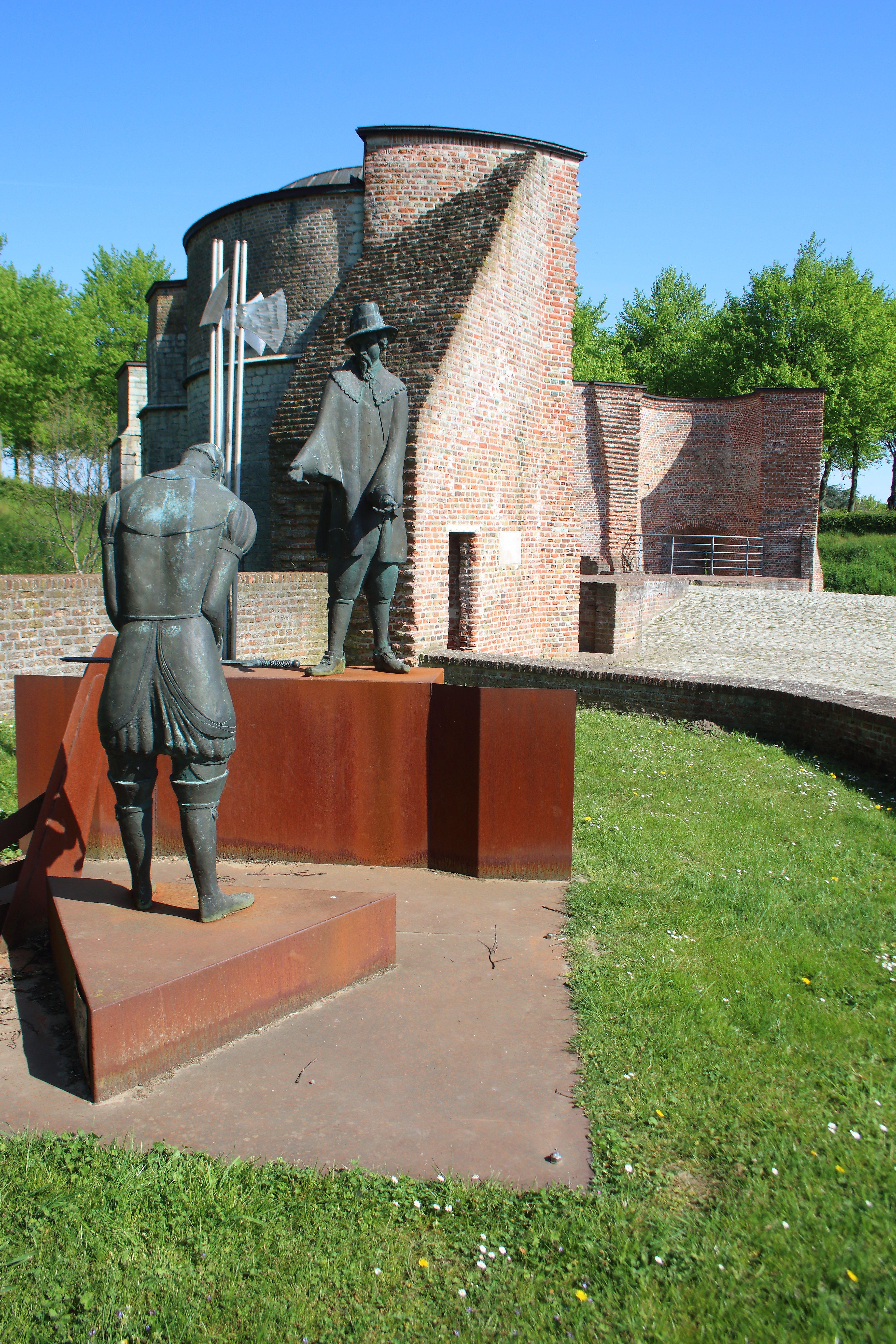 Keldermanspoort, Hulst, Zeeuws-Vlaanderen, Zeeland, Nederland